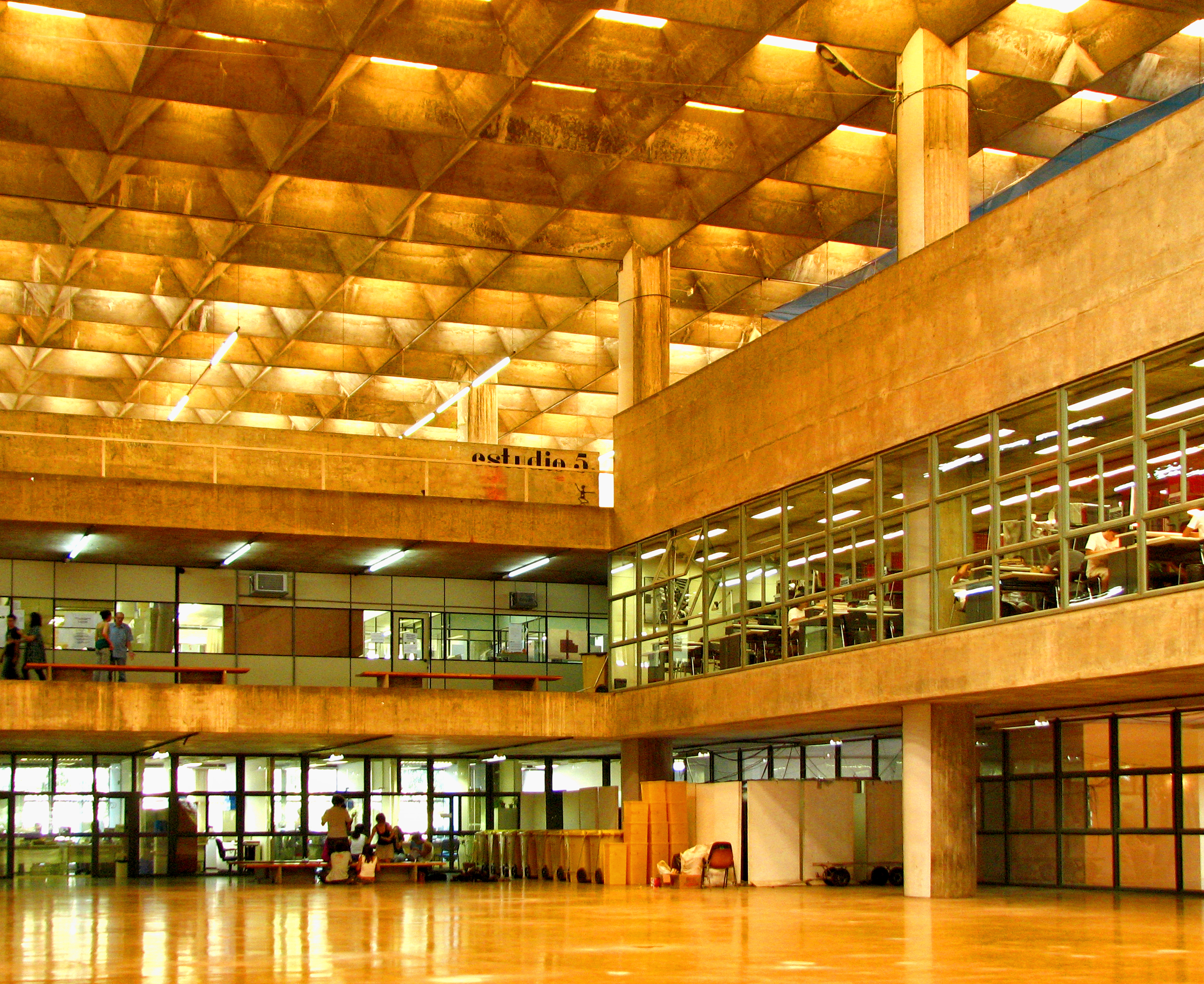 caramelo